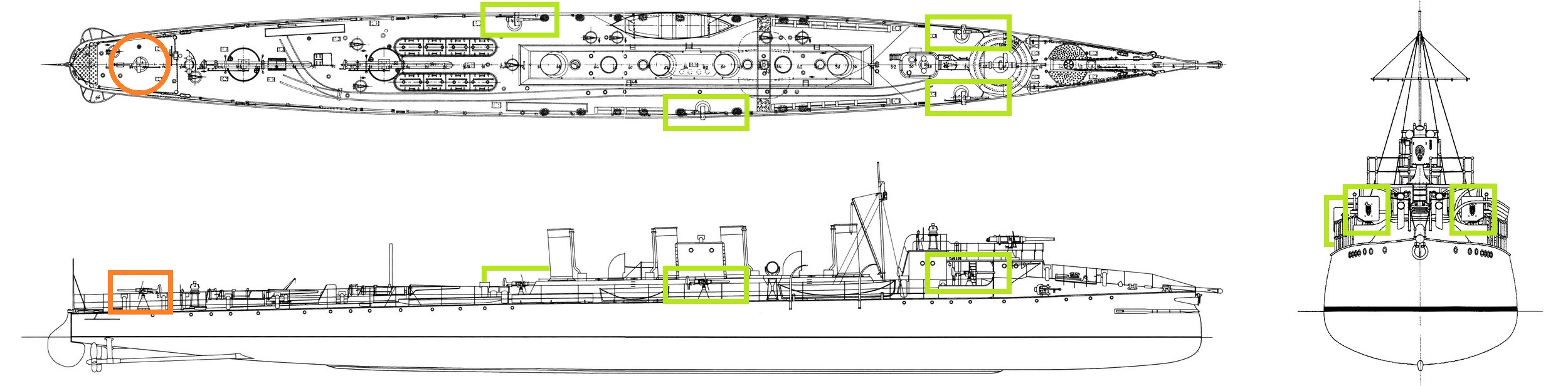 Создано по материалам архивов РГАВМФ (Ф. 421, Оп.12)